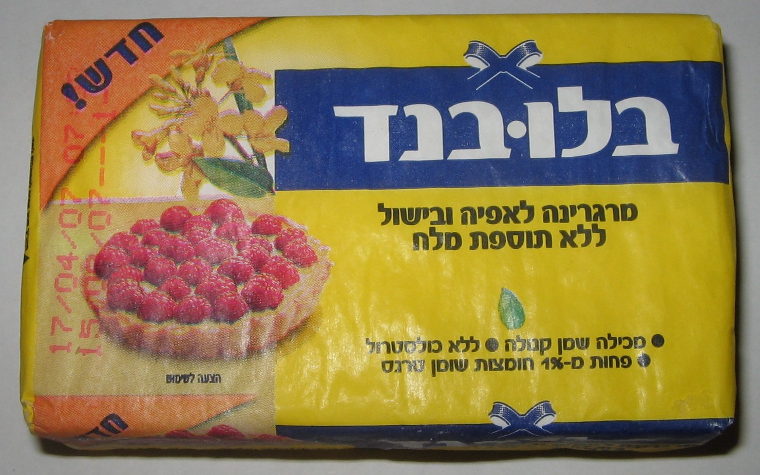 "BlueBend" Margarine